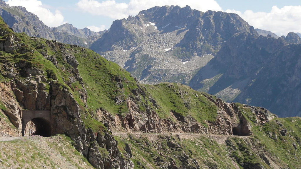 Tunnels à Super-Barèges (Hautes-Pyrénées, France)